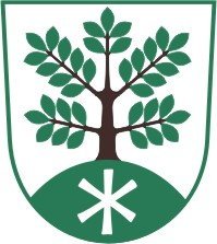 Křišťanovice